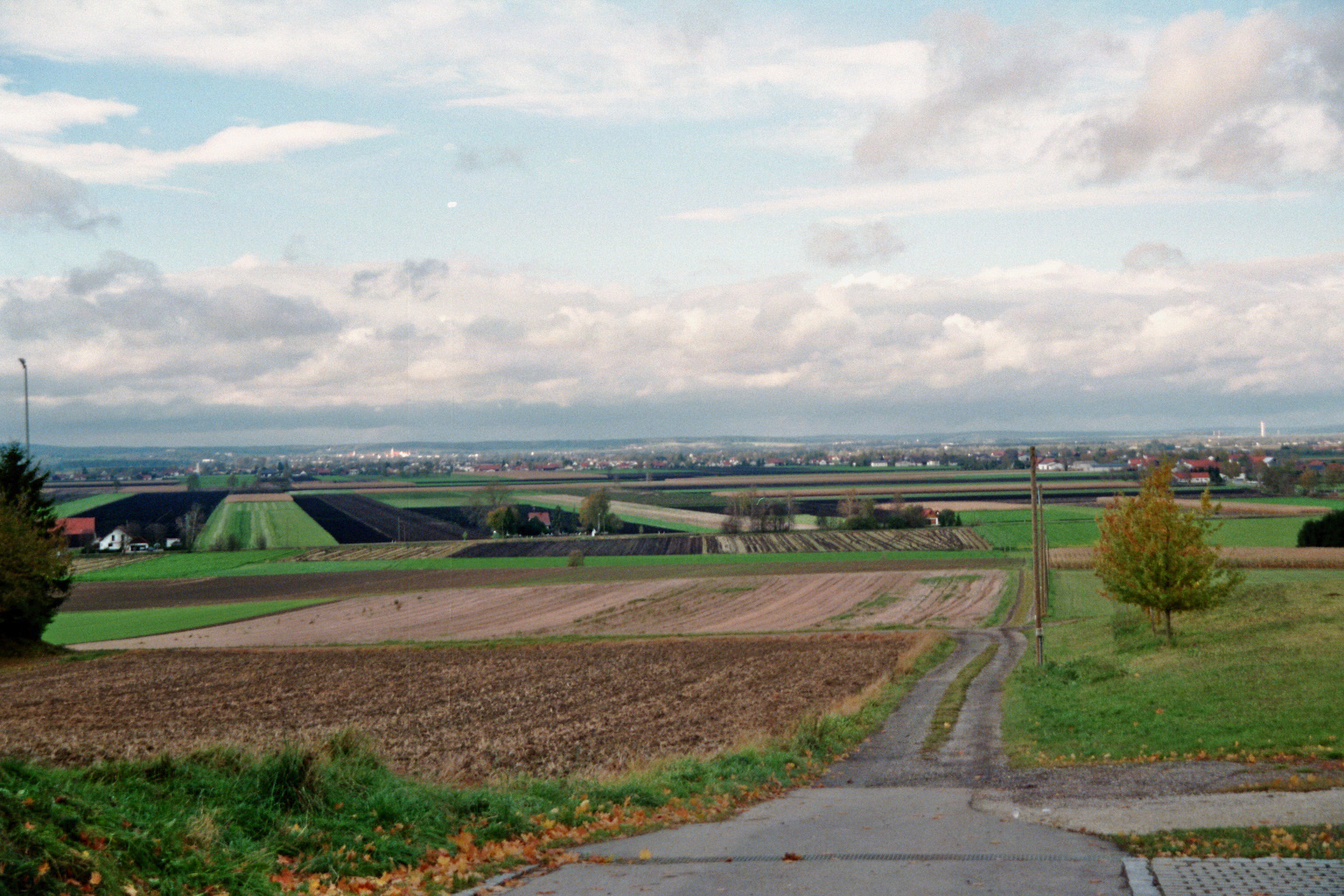 Blick ins Donaumoos, nahe dem Donaumoos-Denkmal in Berg im Gau, Landkreis Neuburg-Schrobenhausen, Bayern, Deutschland.